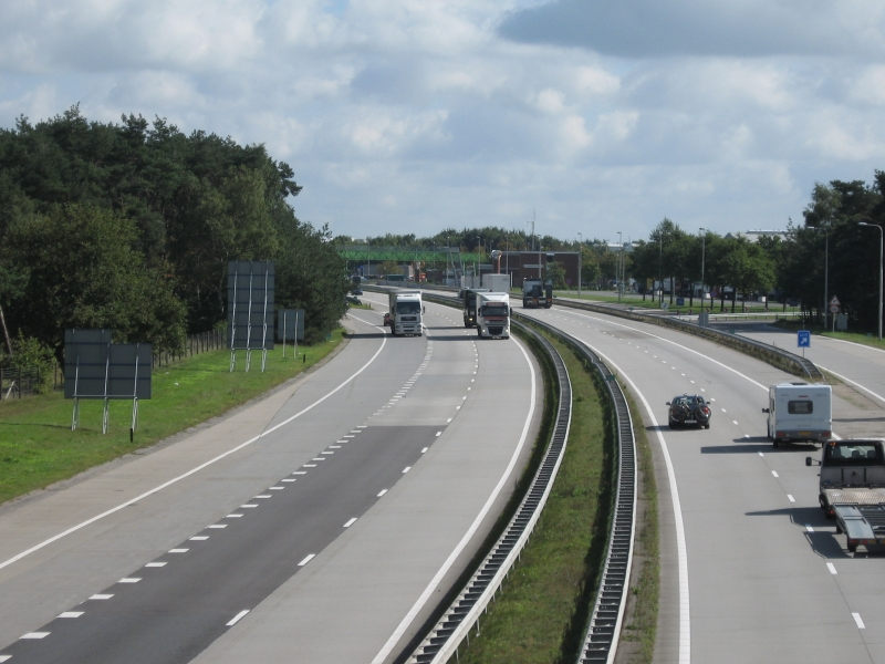 Rijksweg 1 bij de grensovergang Oldenzaal Autoweg